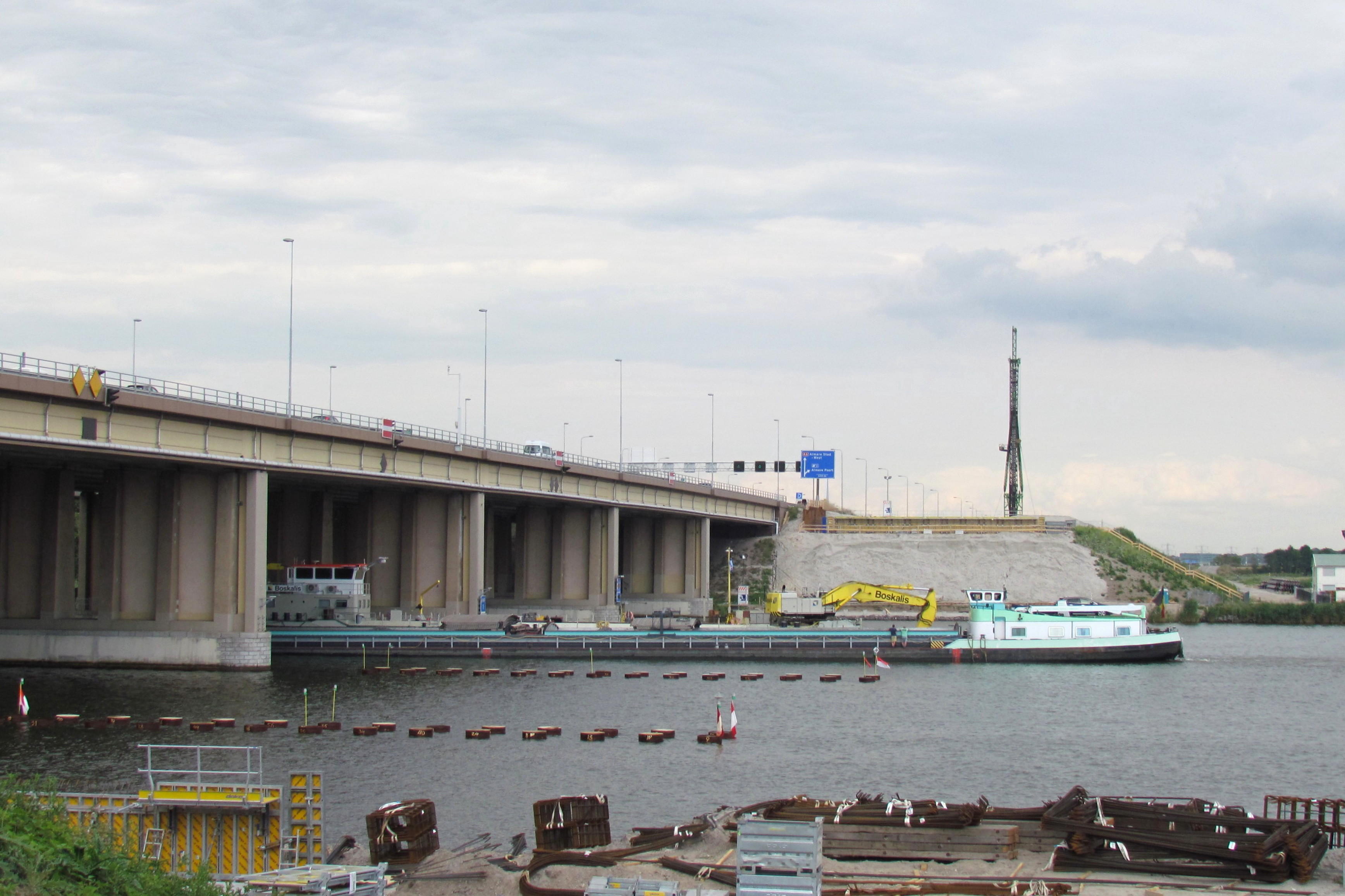 De bouw van de tweede Hollandse Brug is begonnen. Op de voorgrond de Noord-Hollandse (Muiderbergse) kant.